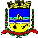 Brasão de Mirandópolis